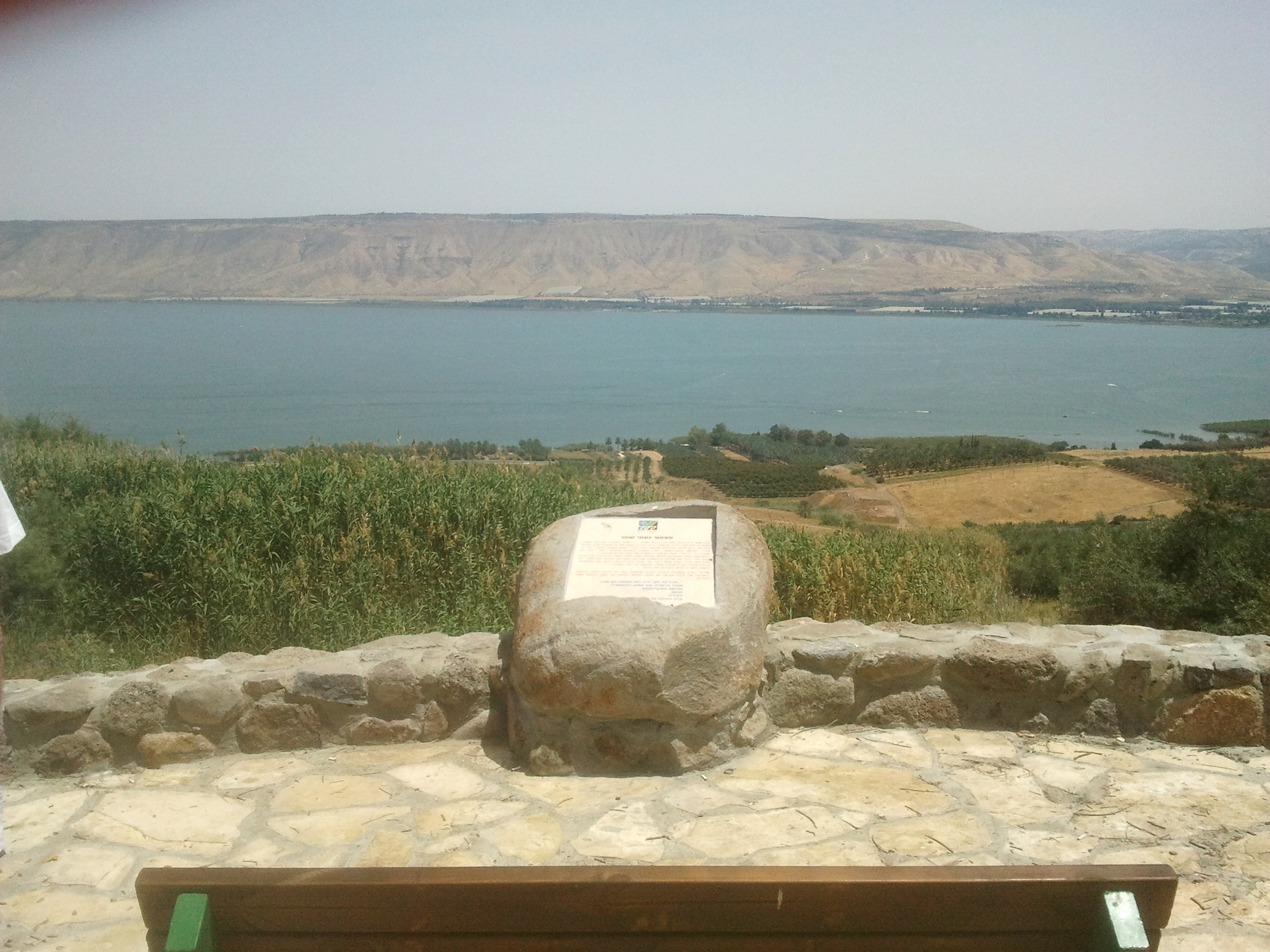 עין פוריה הוא מעיין ברכס פוריה מעל מושבת כנרת. המעיין שוכן בקרבת מקום בו התיישבה בשנות ה-20 של המאה ה-20 קבוצת הר-כנרת. מצפור נעמי שמר בקרבת המעיין